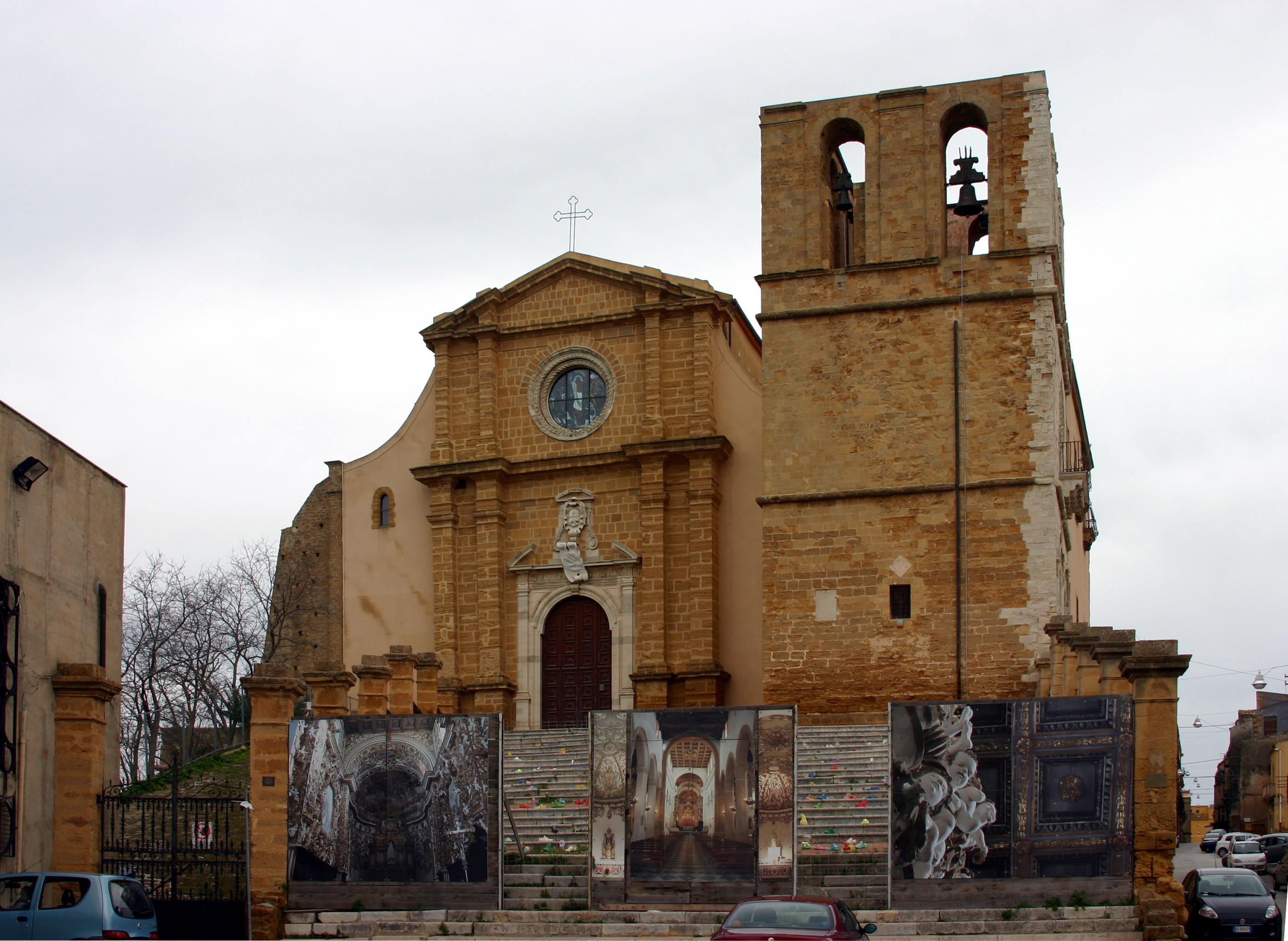 Cathedral (Agrigento)